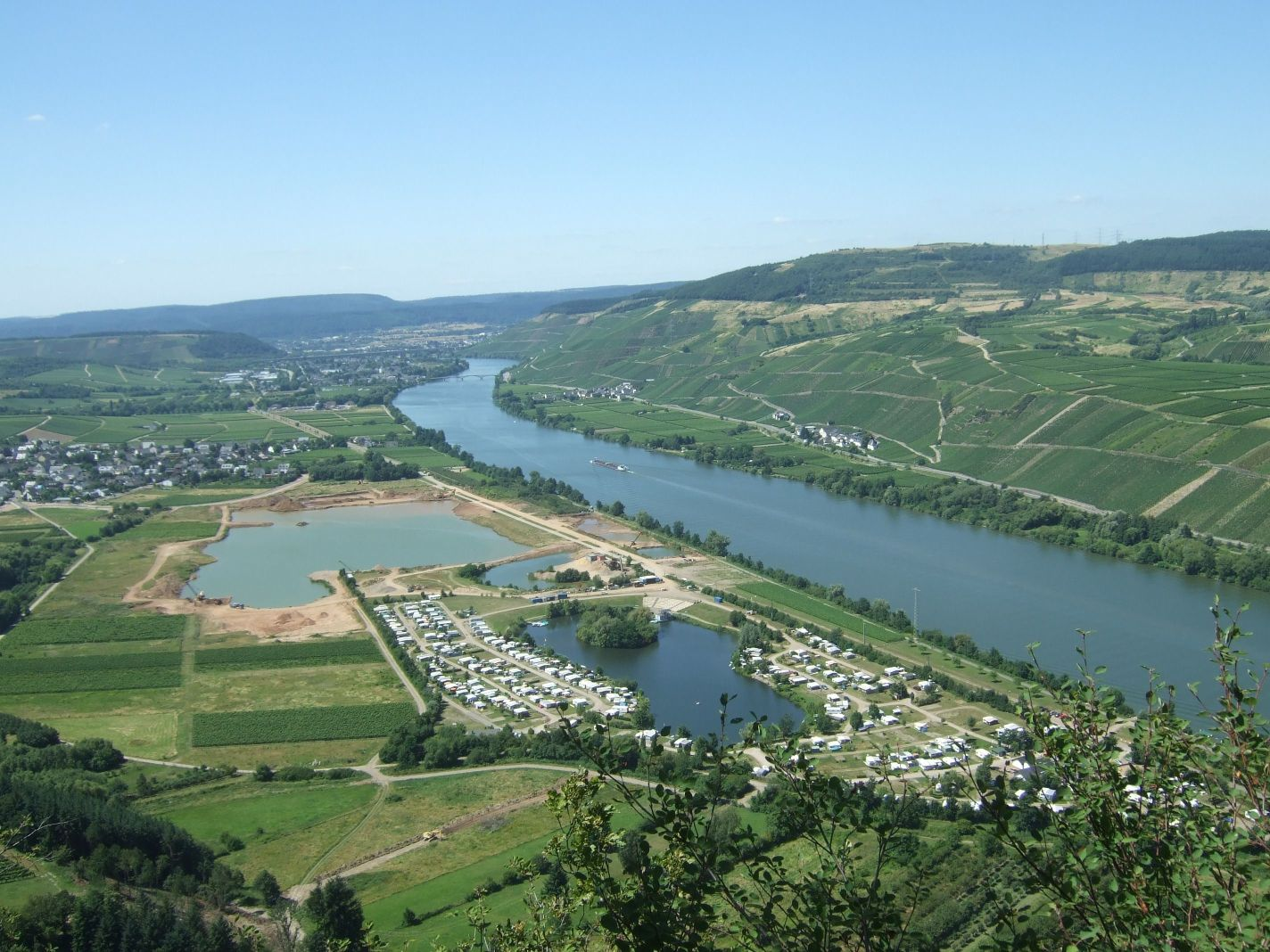 Mosel bei Riol, Deutschland